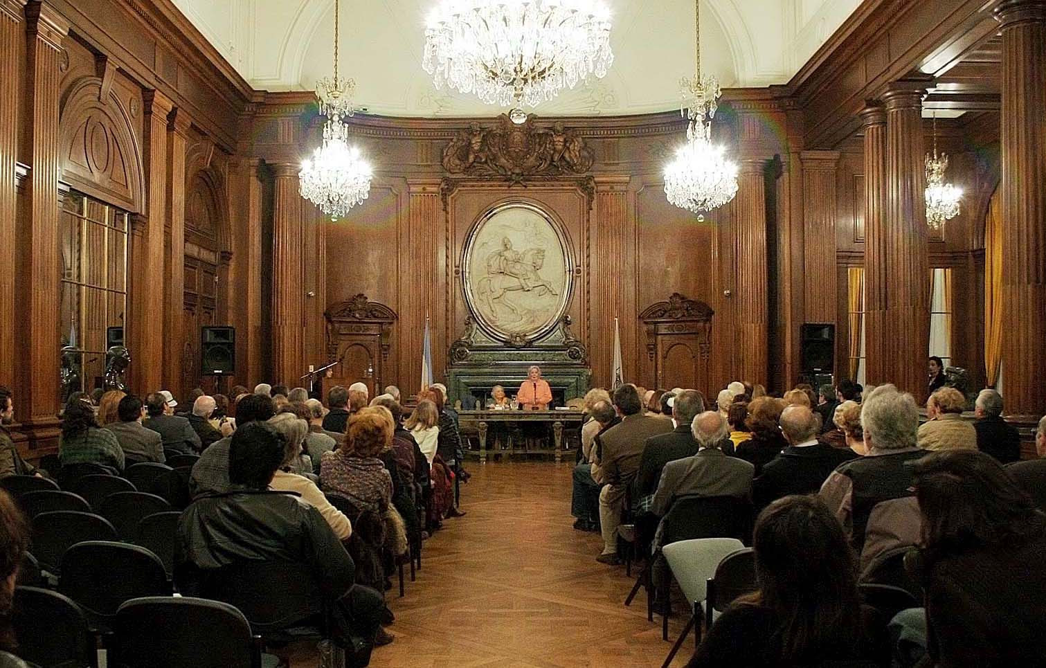 Lily Sosa de Newton en el Salón San Martín de la Legislatura. Crédito: Foto Lena Szankay